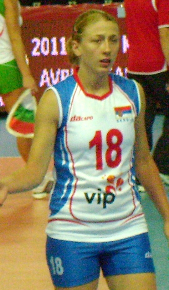 Serbian volleyball player Suzana Ćebić